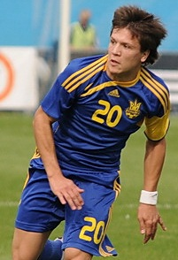 Євген Коноплянка (Україна U-21)